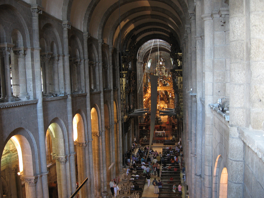 Interior de la «Catedral de Santiago de Compostela»